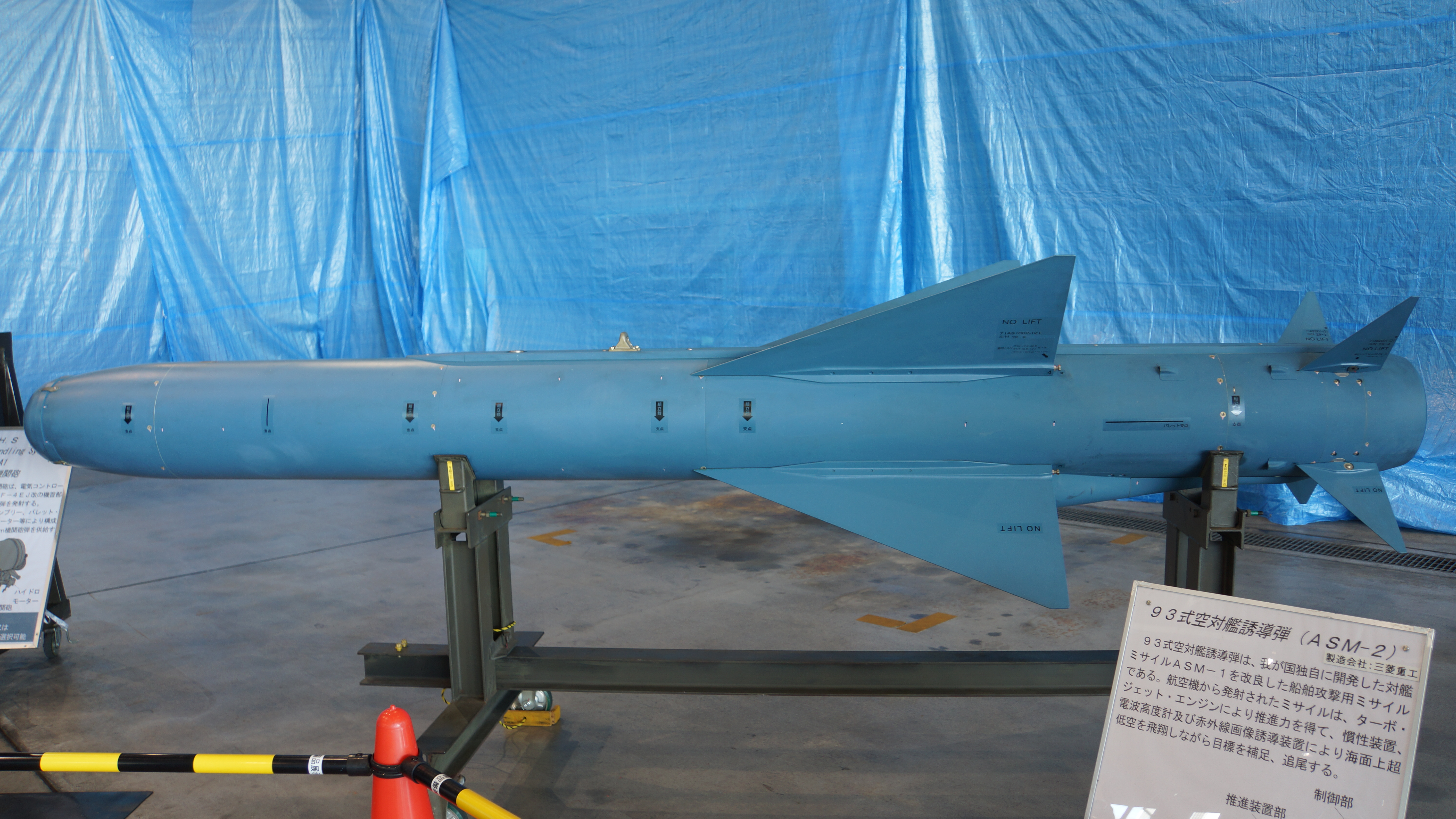 航空自衛隊 93式空対艦誘導弾（ASM-2） ダミー飛しょう体 左側面。2016年10月30日 岐阜基地にて。